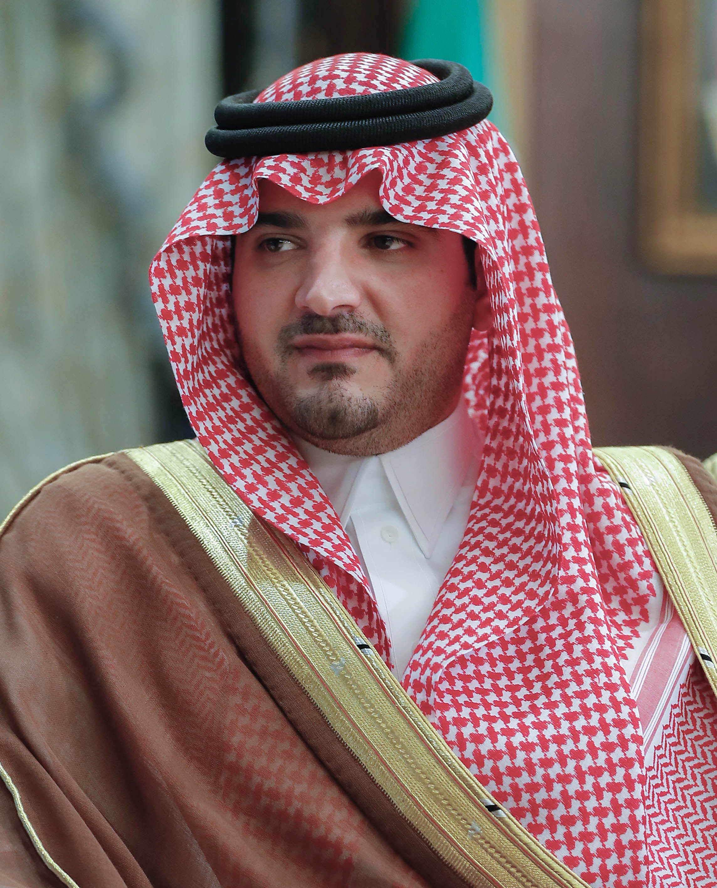 وزير الداخلية بالمملكة العربية السعودية